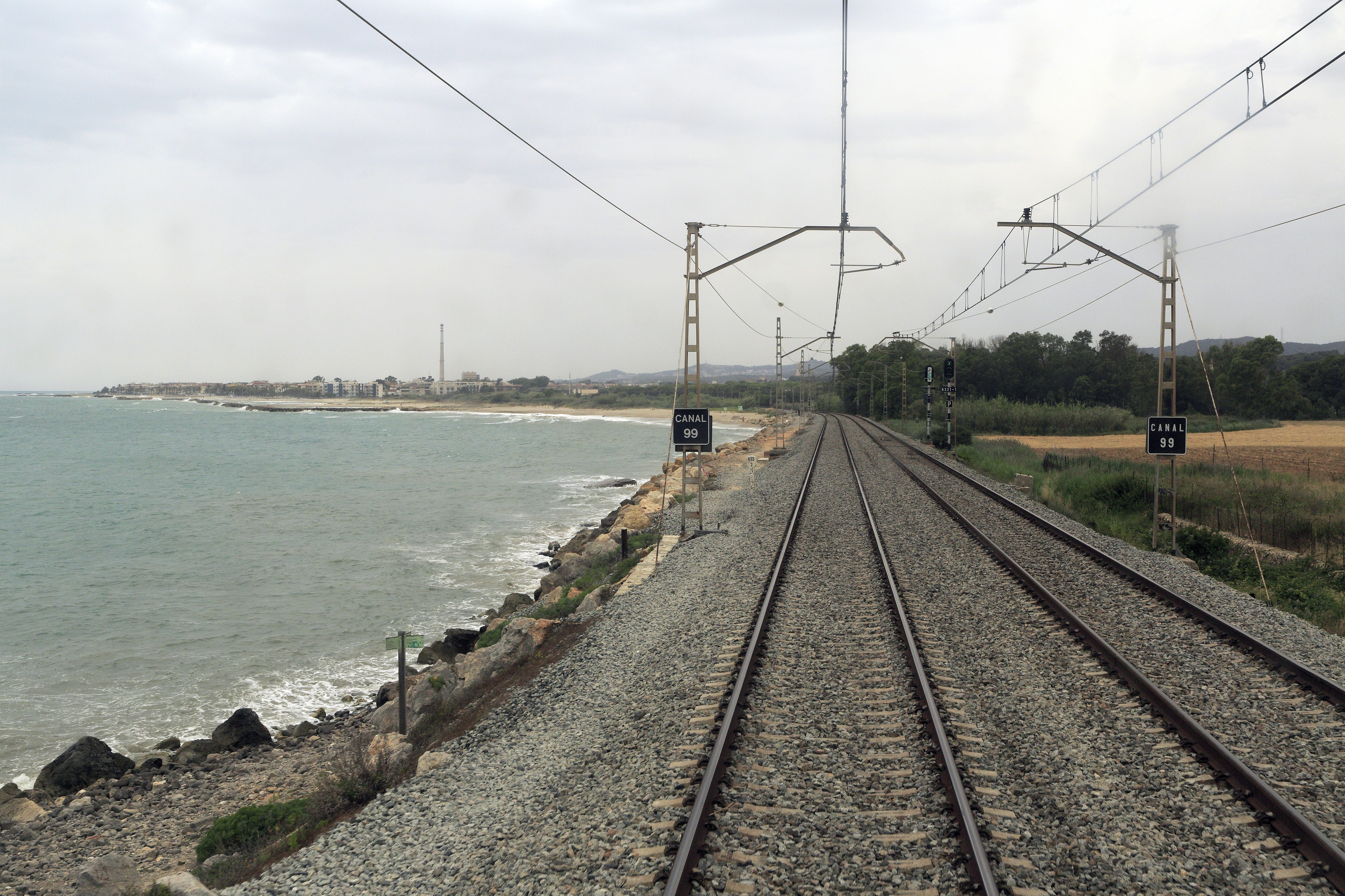 Östlich von Cubelles verläuft die Strecke Barcelona–Sant Vincenç unmitelbar an der Küste. Im Hintergrund die Playa Larga von Cubelles.